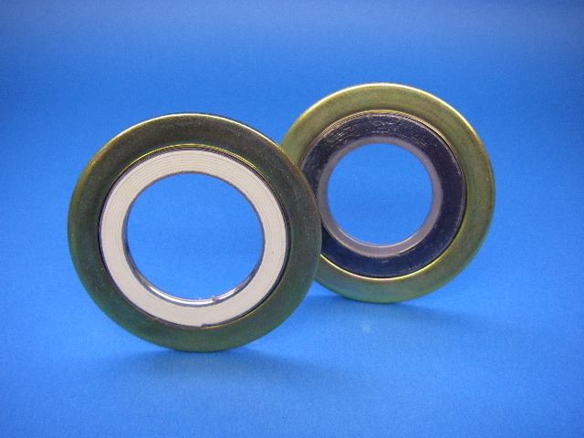 vortex